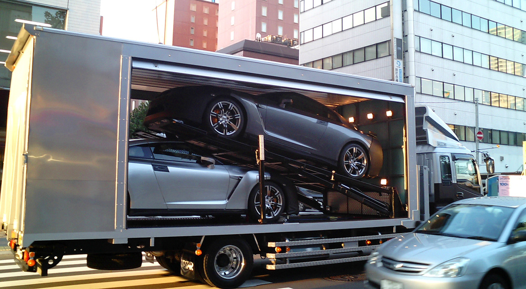 in Japan. わざとらしく、さりげなさを演出中（？）